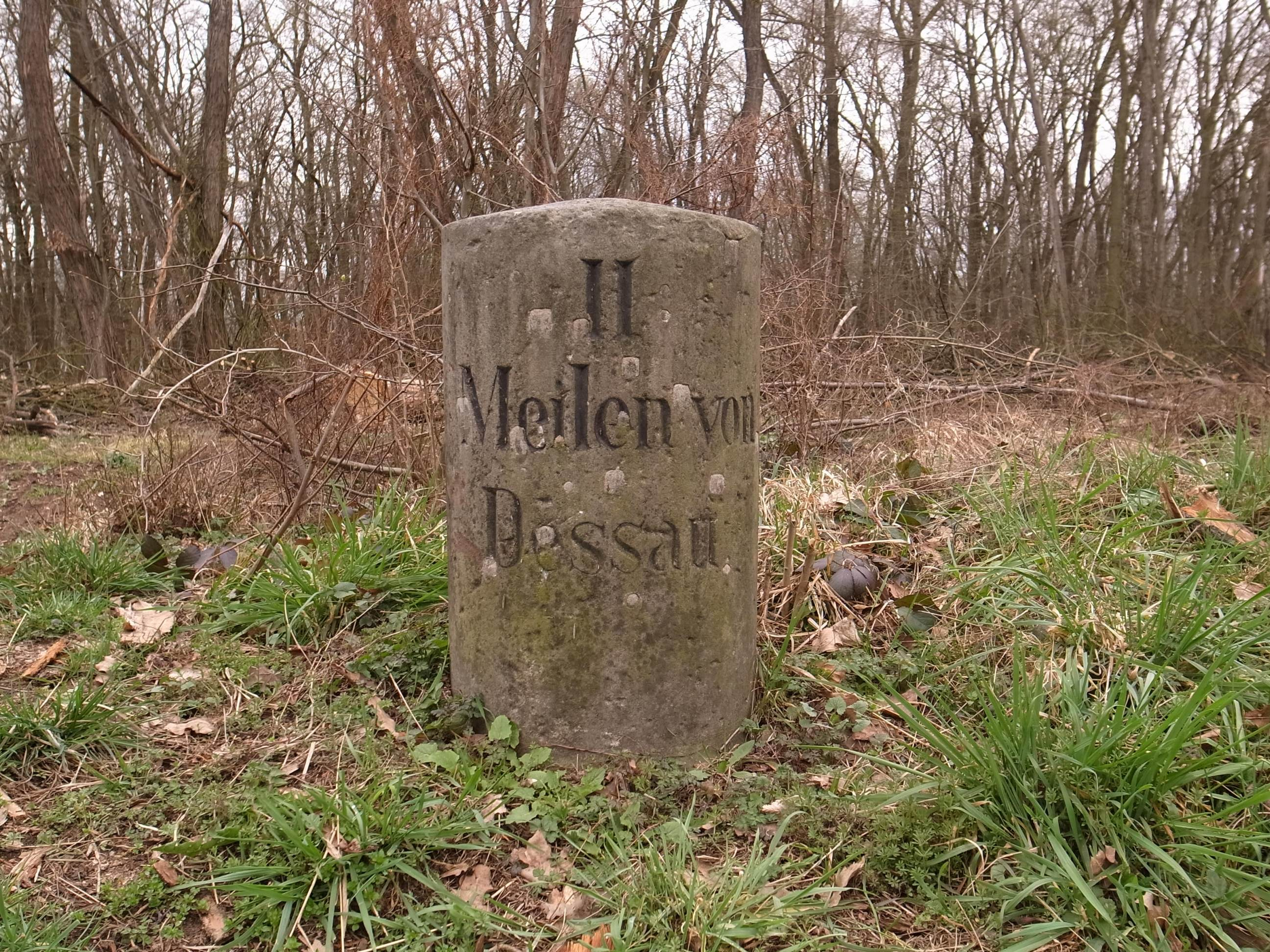 Meilenstein zwischen Sollnitz und Retzau, II Meilen von Dessau